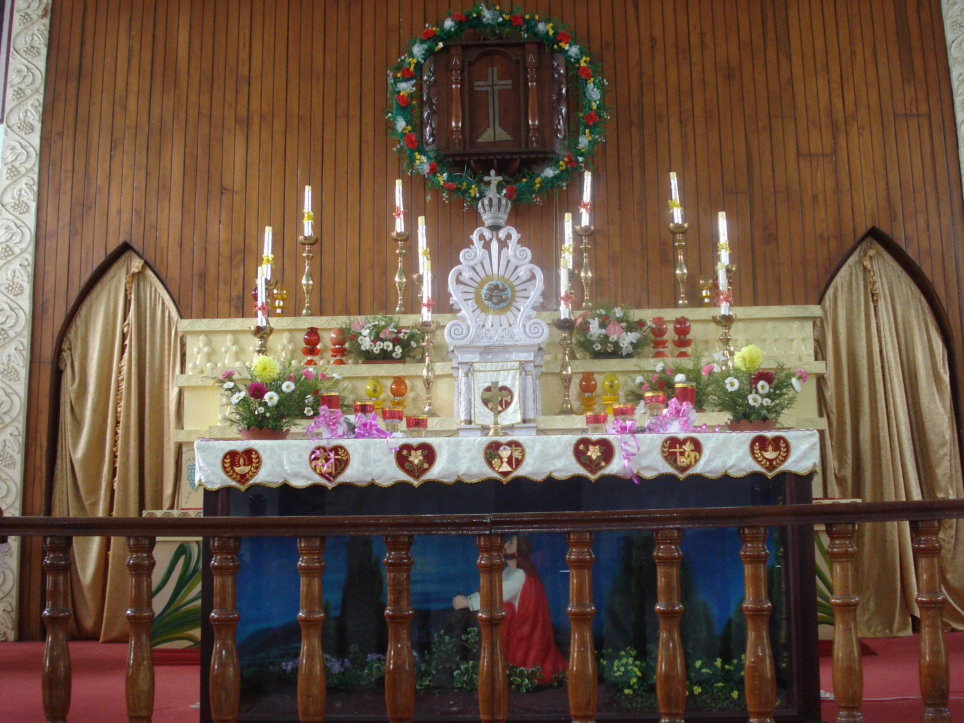 മാർ ശ്ലീവ പള്ളി മാപ്രാണം